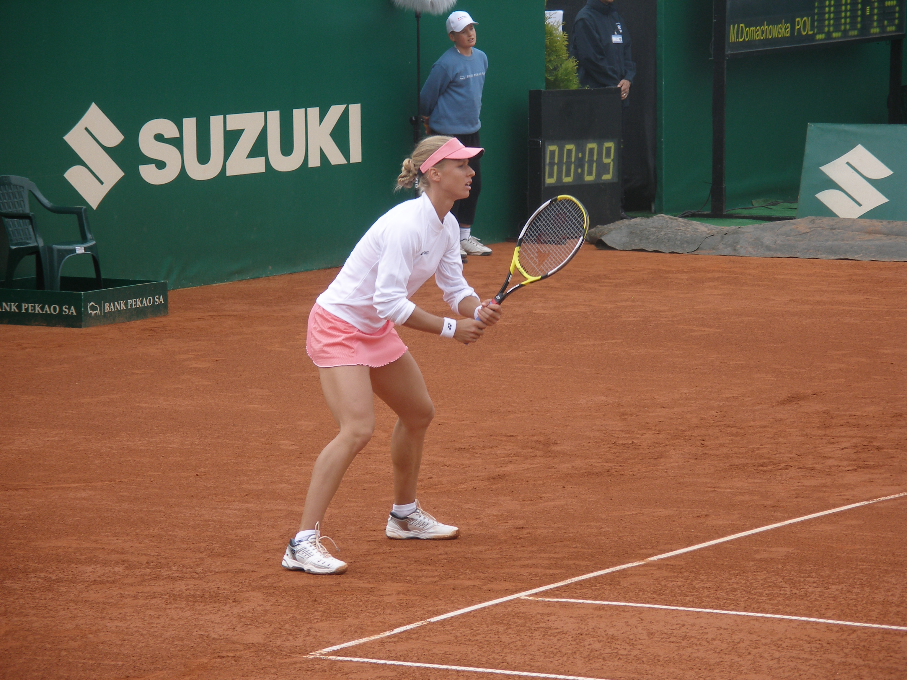 Jelena Dementiewa podczas Suzuki Warsaw Masters 2008